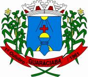 Blason de la municipalité de Guaraciaba - Brésil